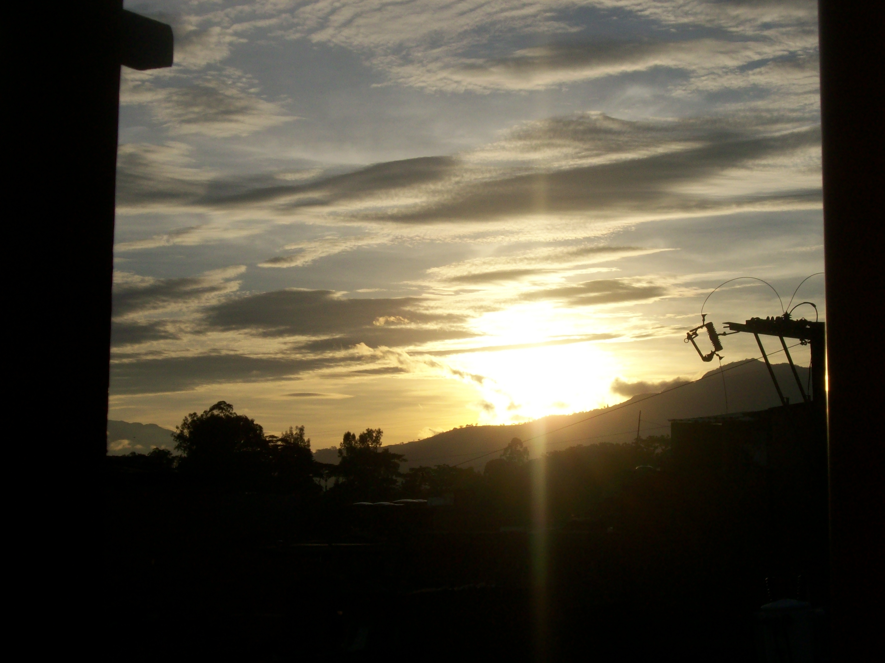 Se puede apreciar el amanecer desde la ciudad de Bello, Antioquia. El 07 de junio del 2012